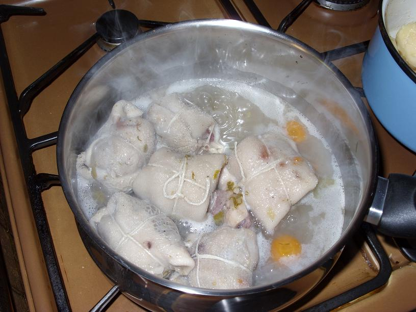 Photos de trenels millavois - Millau (Aveyron)